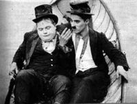 Fotografía de la película The Rounders de Charlie Chaplin